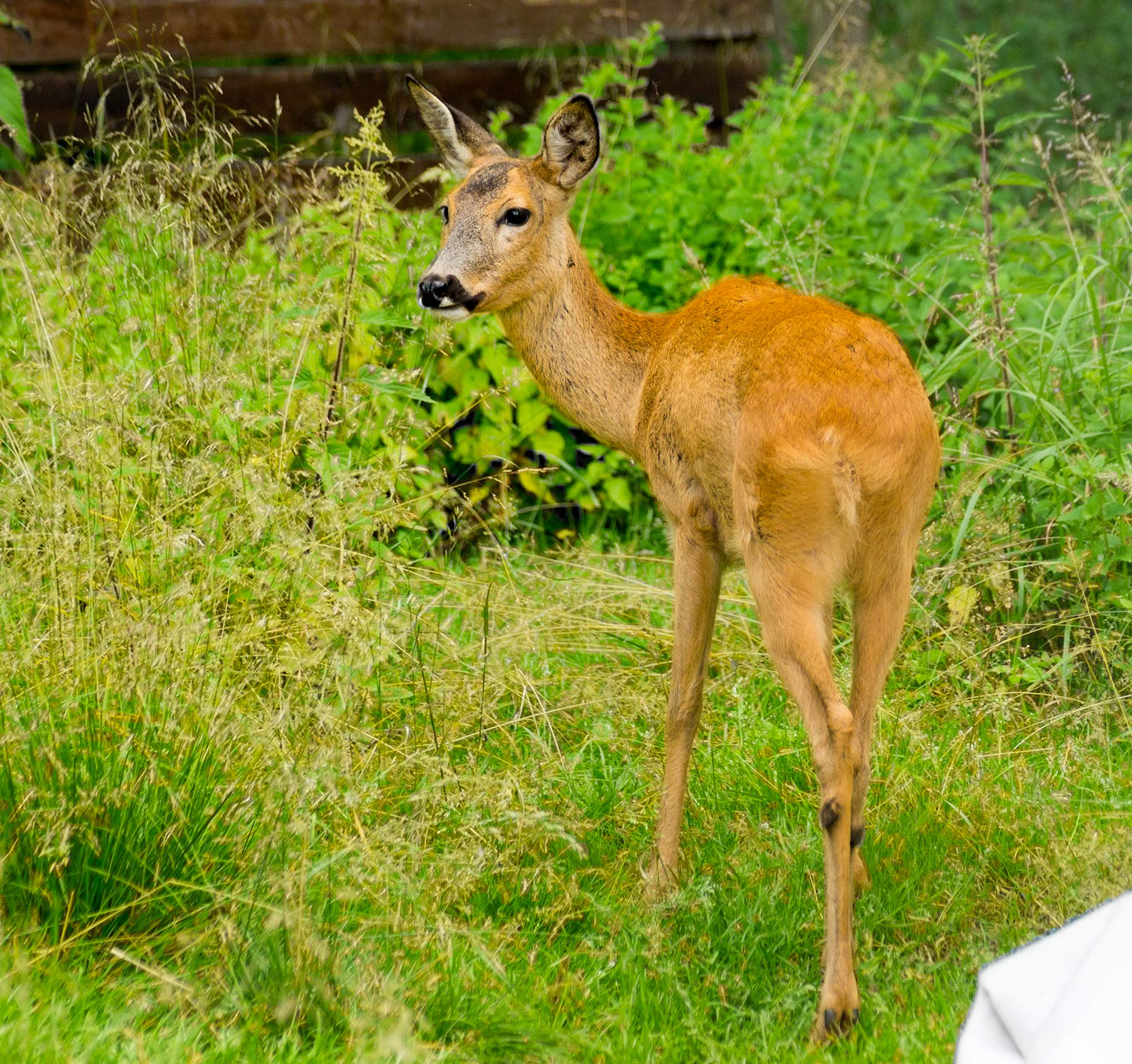 Косуля на Лосиноостровской биостанции